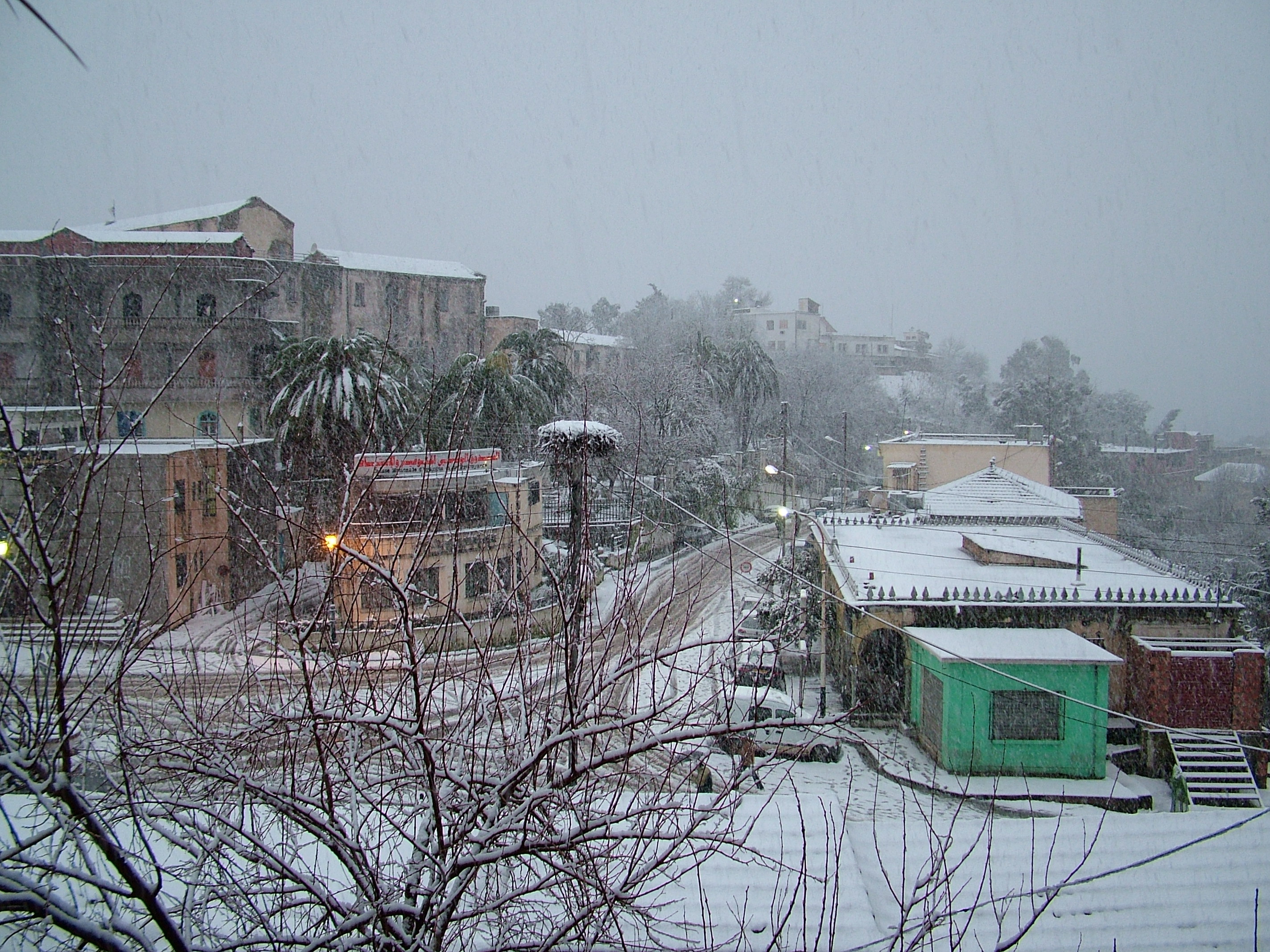 Un hiver très agité à El Milia (Algérie).